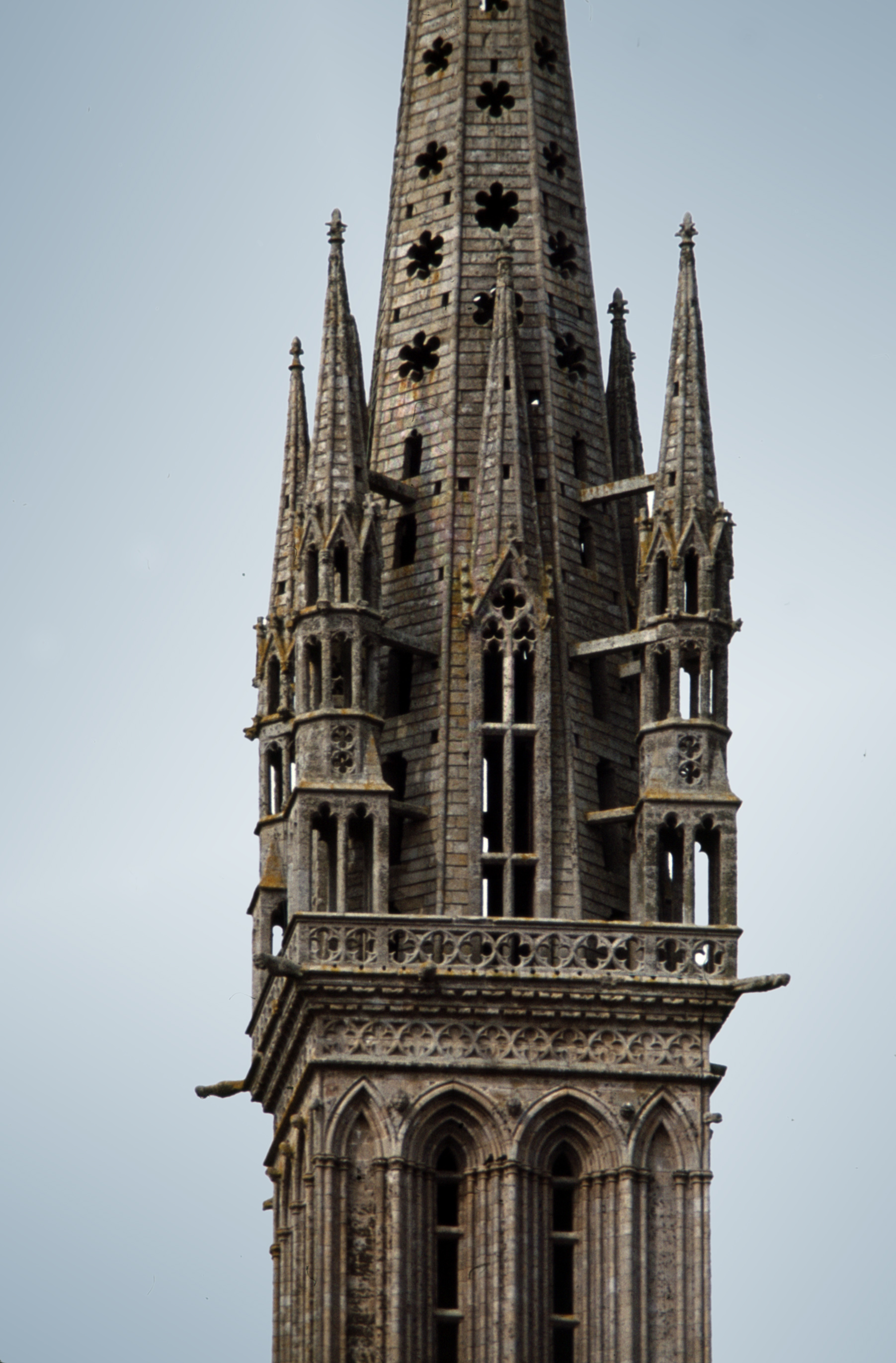 Saint-Pol-de-Léon